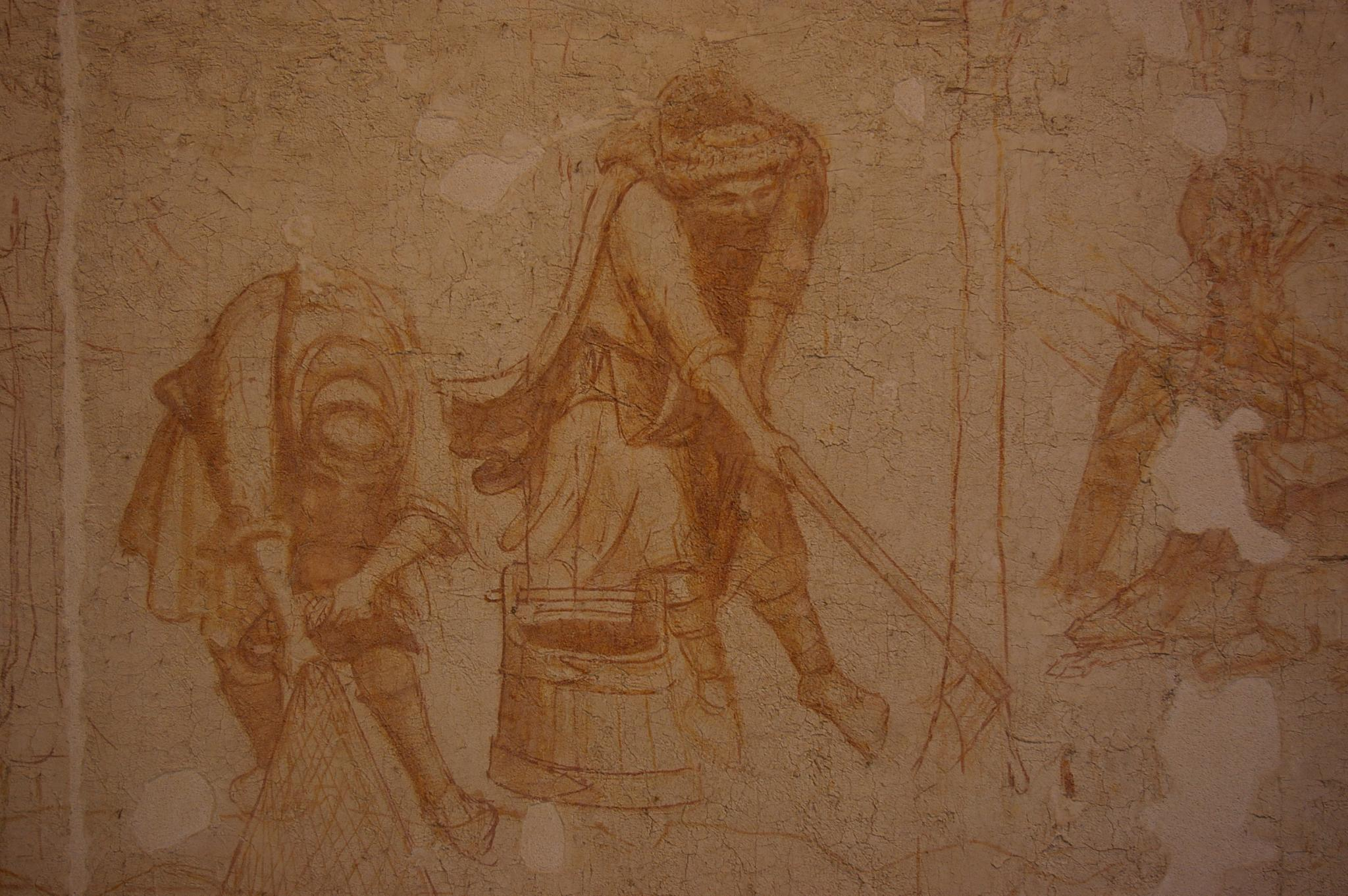 Museo delle Sinopie, Pisa - Italia.